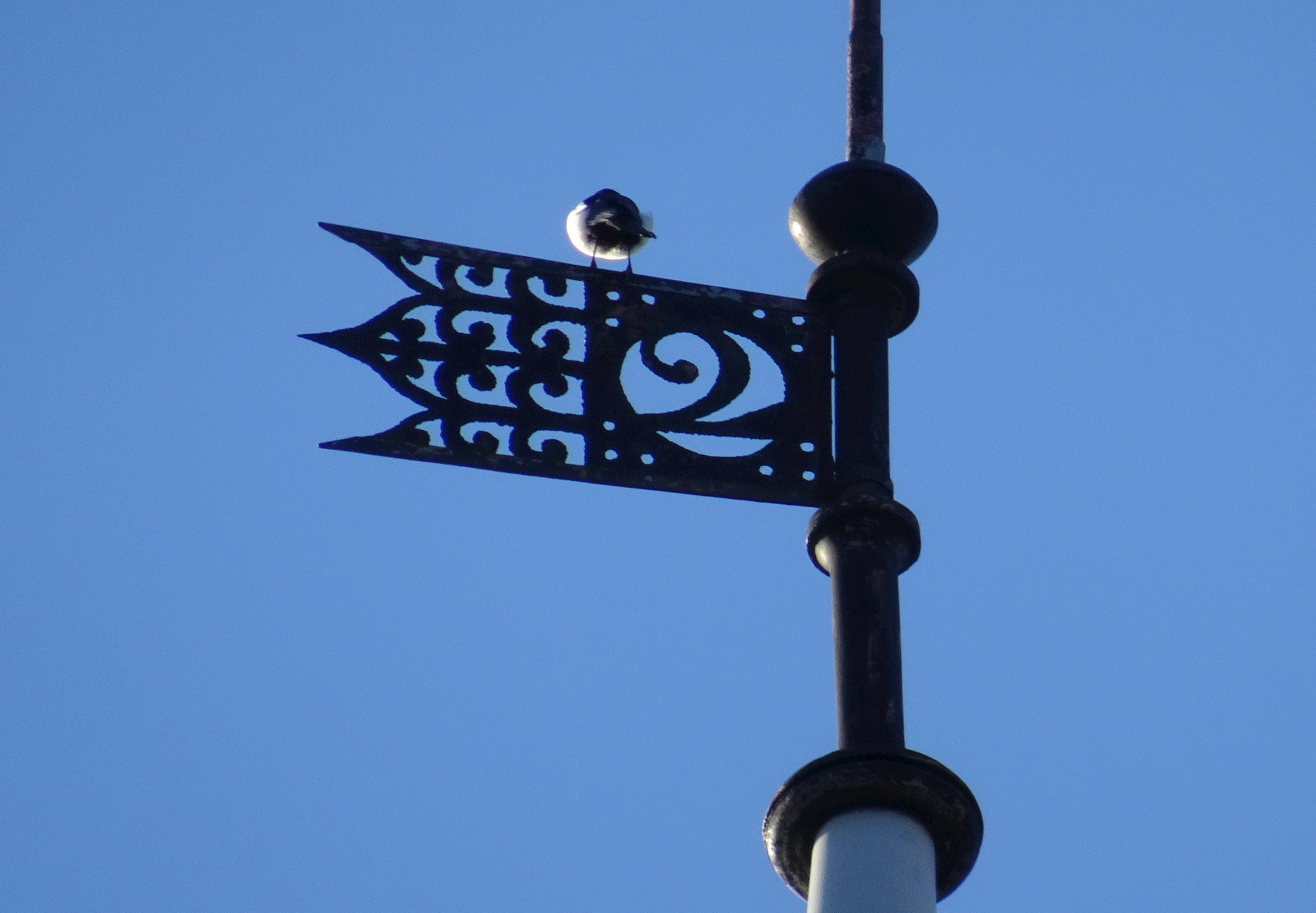 Fastigheten Kattan mindre 5, vindflöjel på tornet